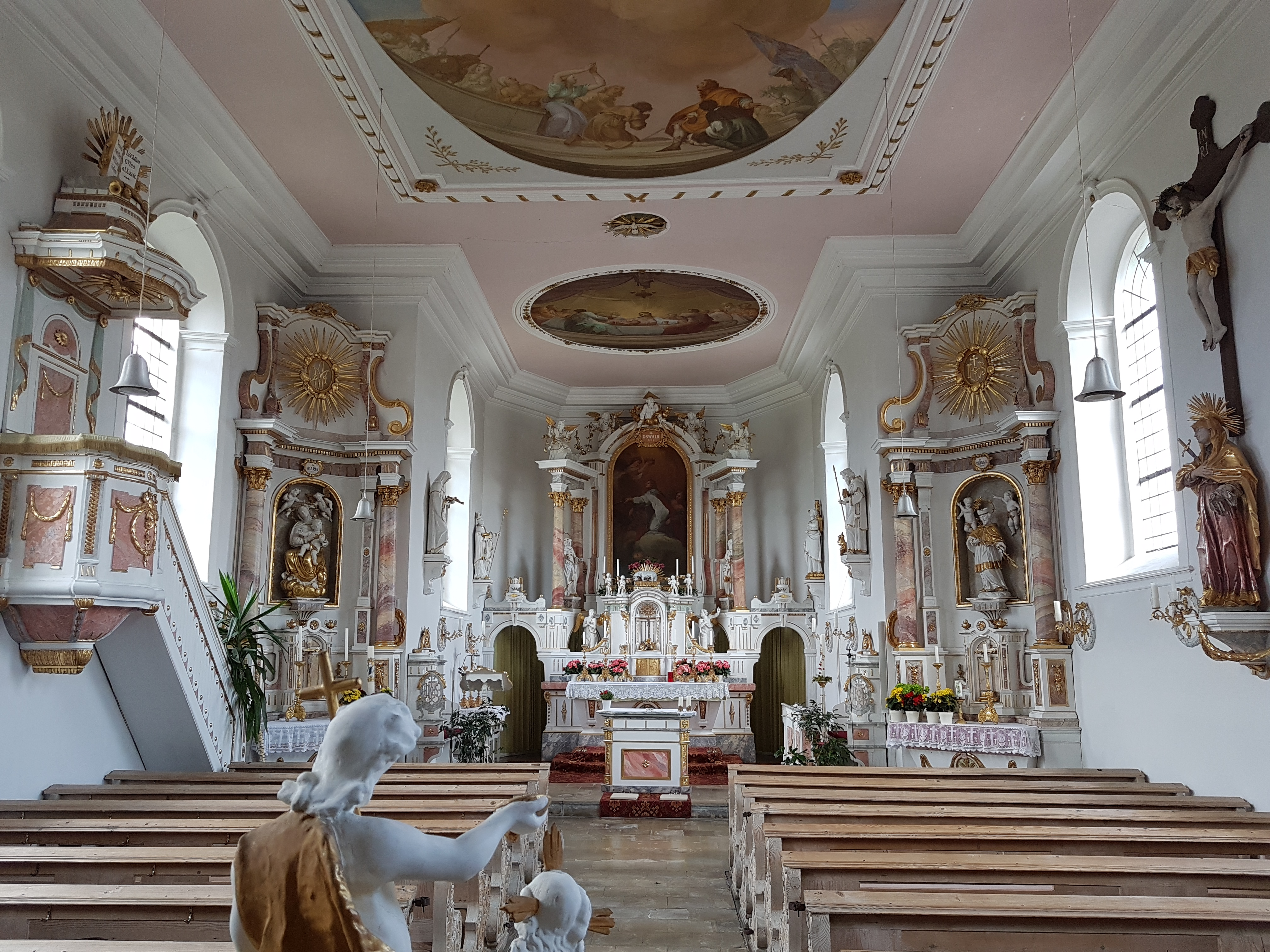 Thannenberg (Burggen), Filialkirche St. Oswald